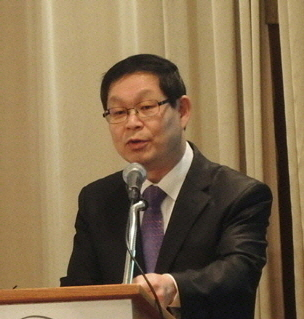 2015 서울모터쇼 개최 기념 기자간담회 (서울모터쇼조직위원회 김용근 조직위원장)